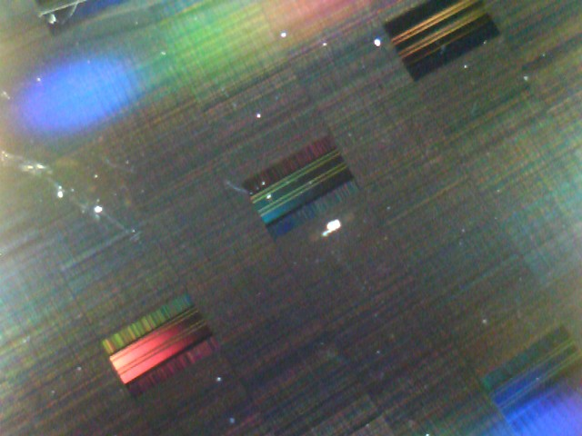 Vergrößerung der DVD-RAM Hardwaresektoren